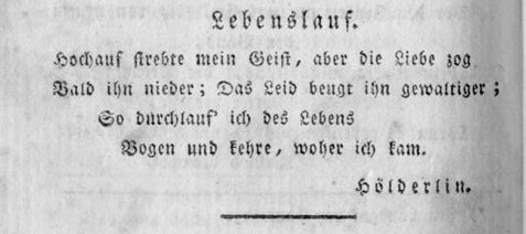 Erstdruck von Lebenslauf Friedrich Hölderlins in erster Fassung im Taschenbuch für Frauenzimmer von Bildung 1799.